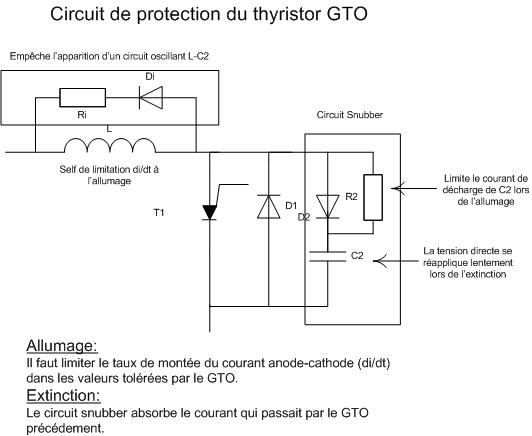 circuit de protection du thyristor GTO